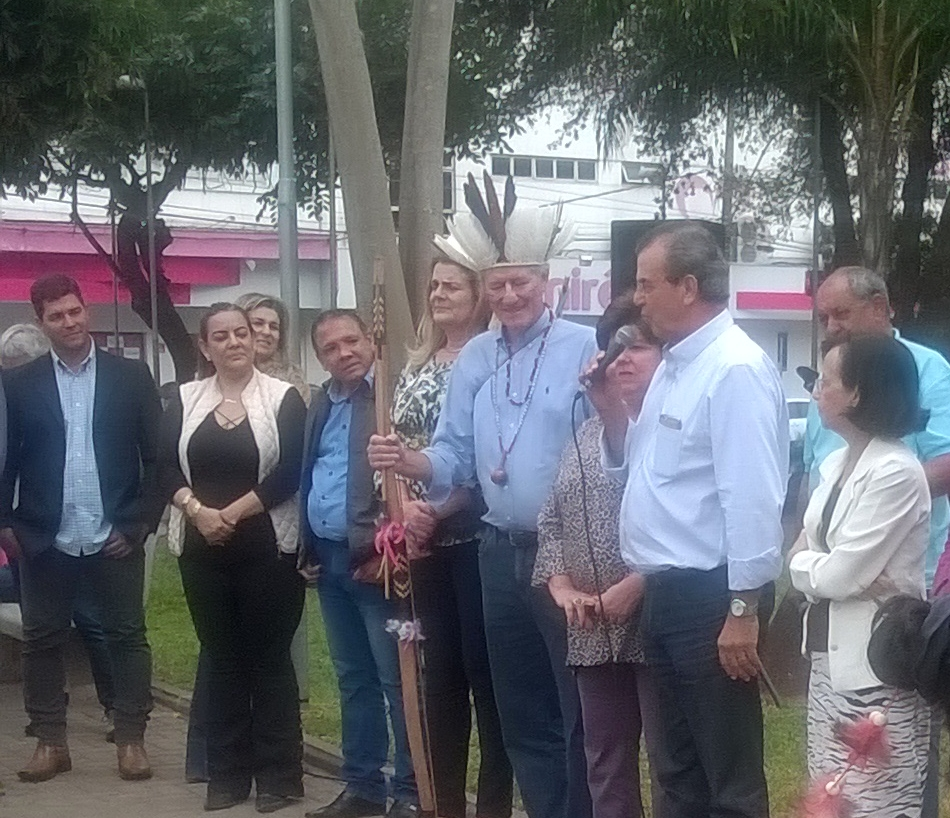 Autoridades de Araçatuba na inauguração da escultura em homenagem aos índios caingangues em 2017. Ao lado esquerdo de Dilador Edna Flor, então vice-prefeita. A sua direita a secretária de cultura Tieza, e o prefeito de Braúna Flávio Giussani